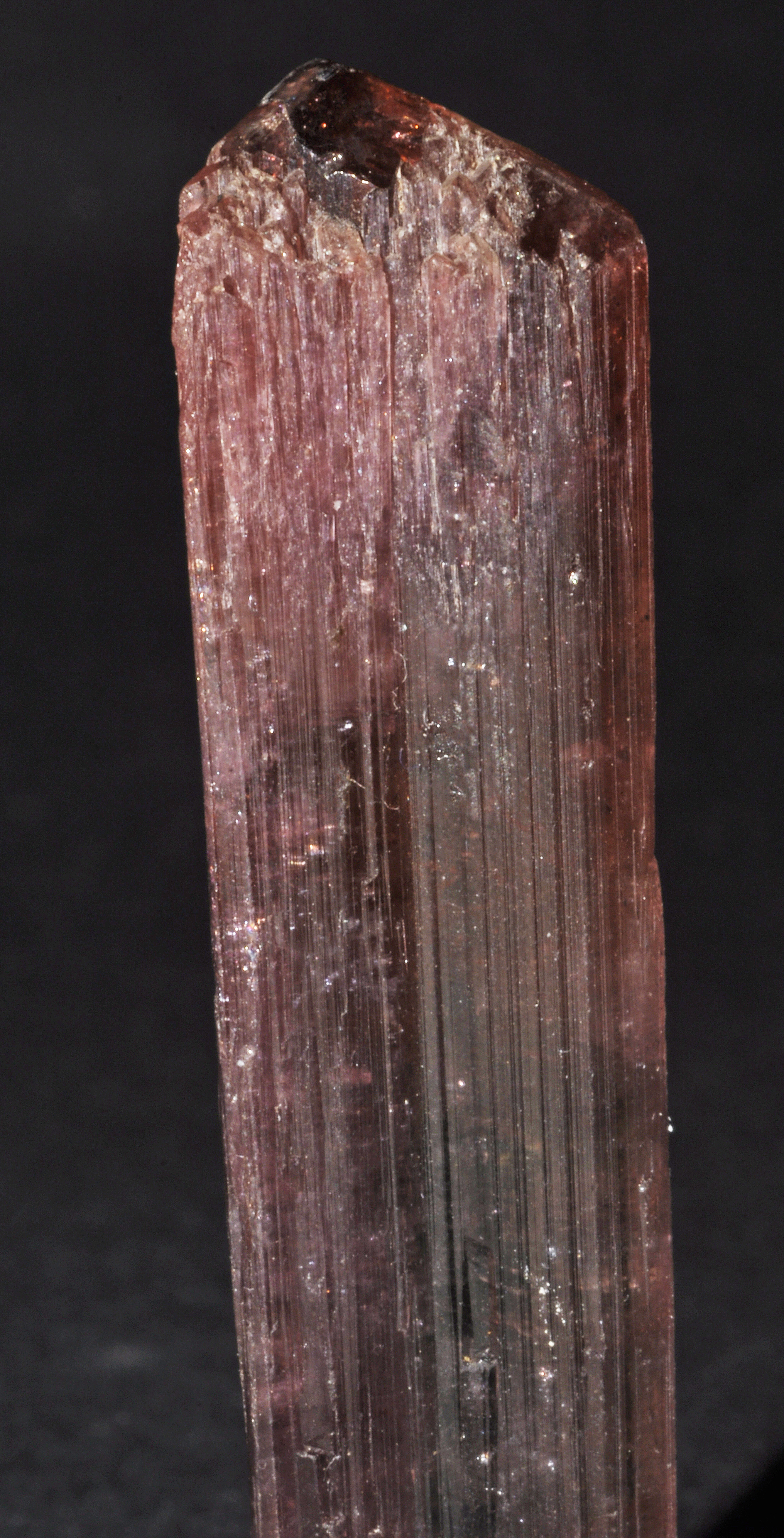 cristal de tourmaline var. rubellite